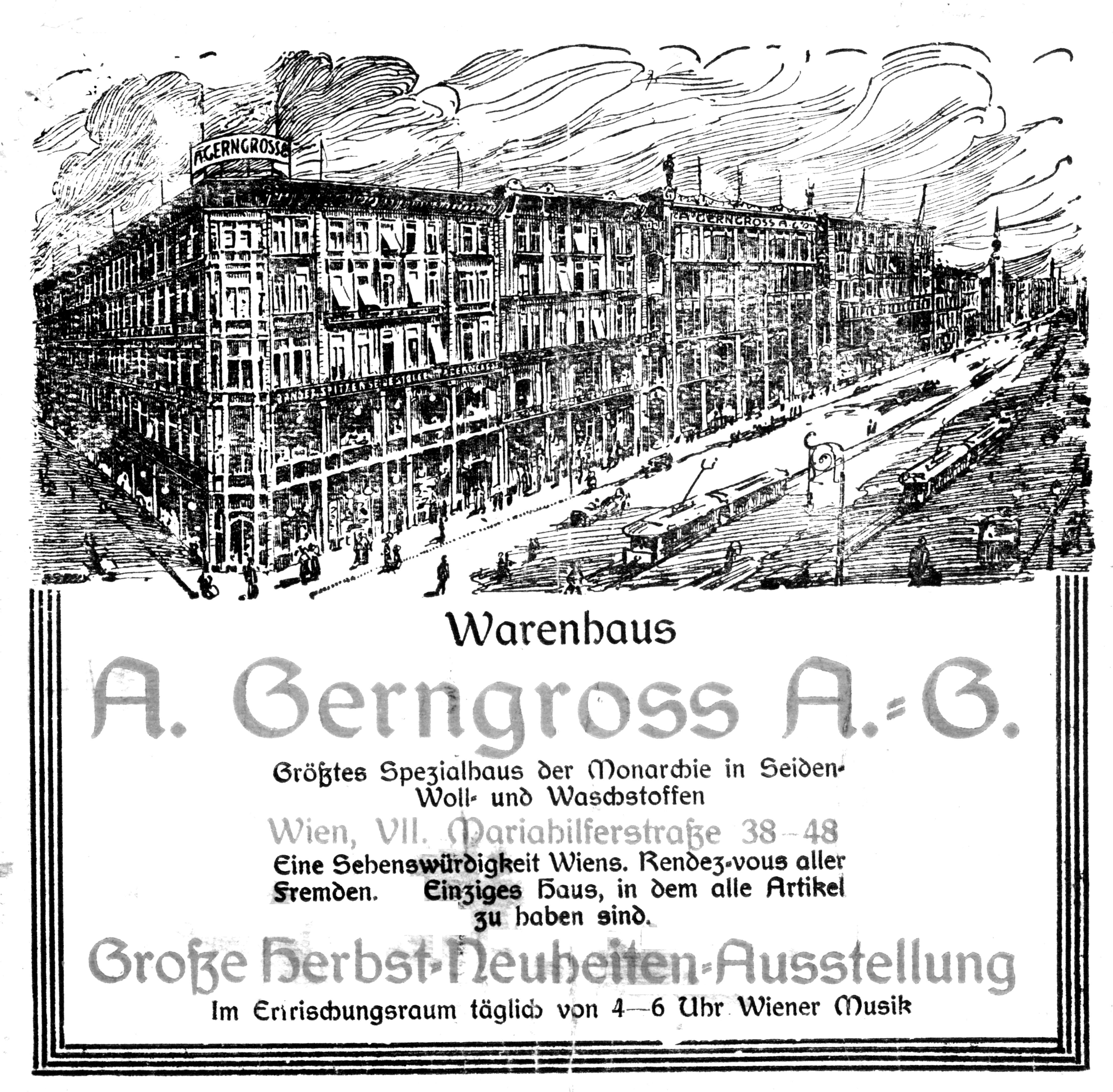 Reklame für das Kaufhaus Gerngross / PR for department store Gerngross in Vienna